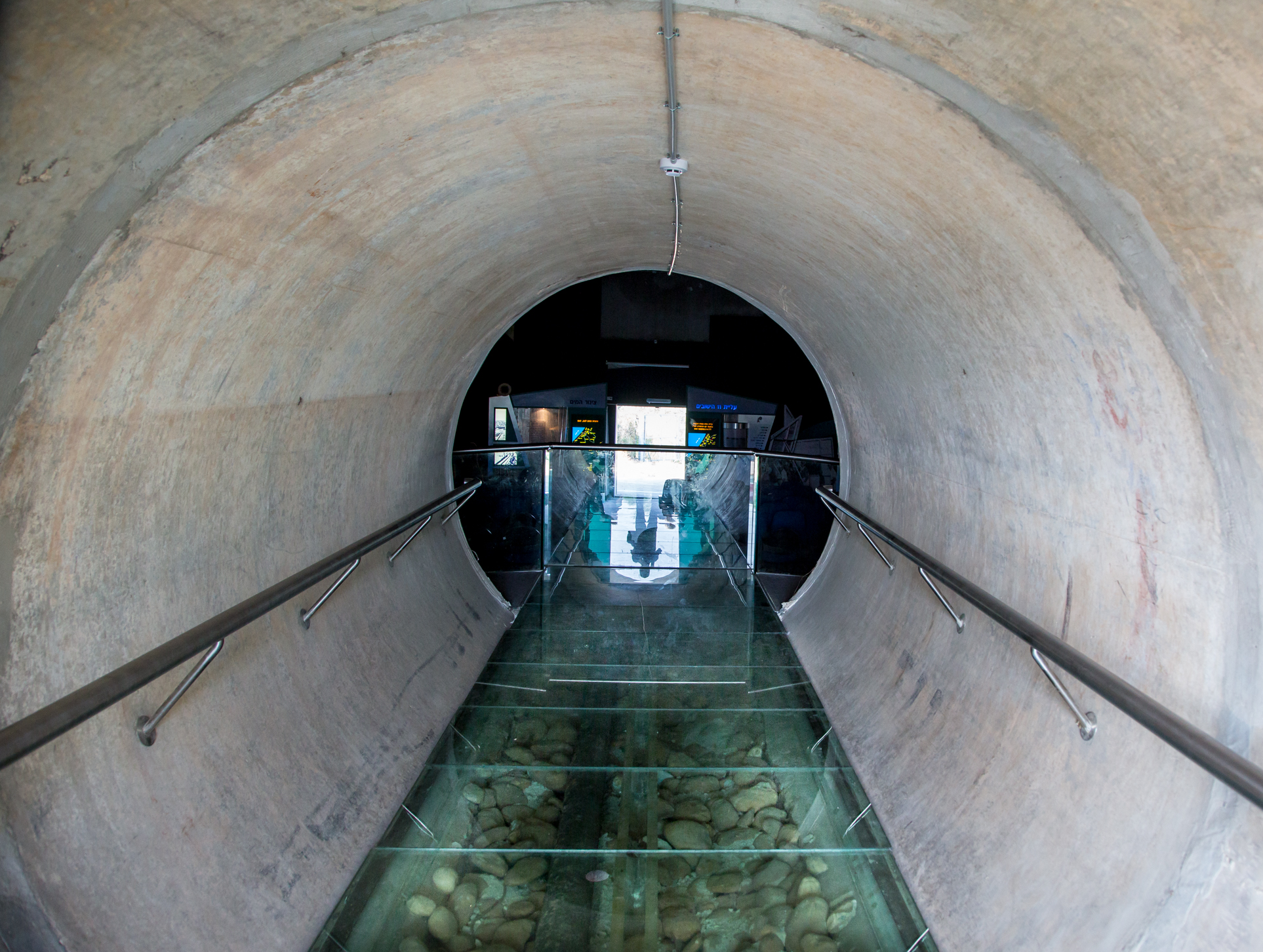 אתר מורשת ייחודי בתחומו, העוסק בתולדות ההתיישבות היהודית בנגב. ממוקם דרומית לקיבוץ ניר-עם, בלב חורש טבעי החולש בתצפית על צפון הנגב. מבנה המוזיאון שוכן במאגר המים המקורי של קיבוץ ניר- עם, ששימש לאגירת המים ושליחתם ל11- נקודות ההתיישבות החדשות בנגב.